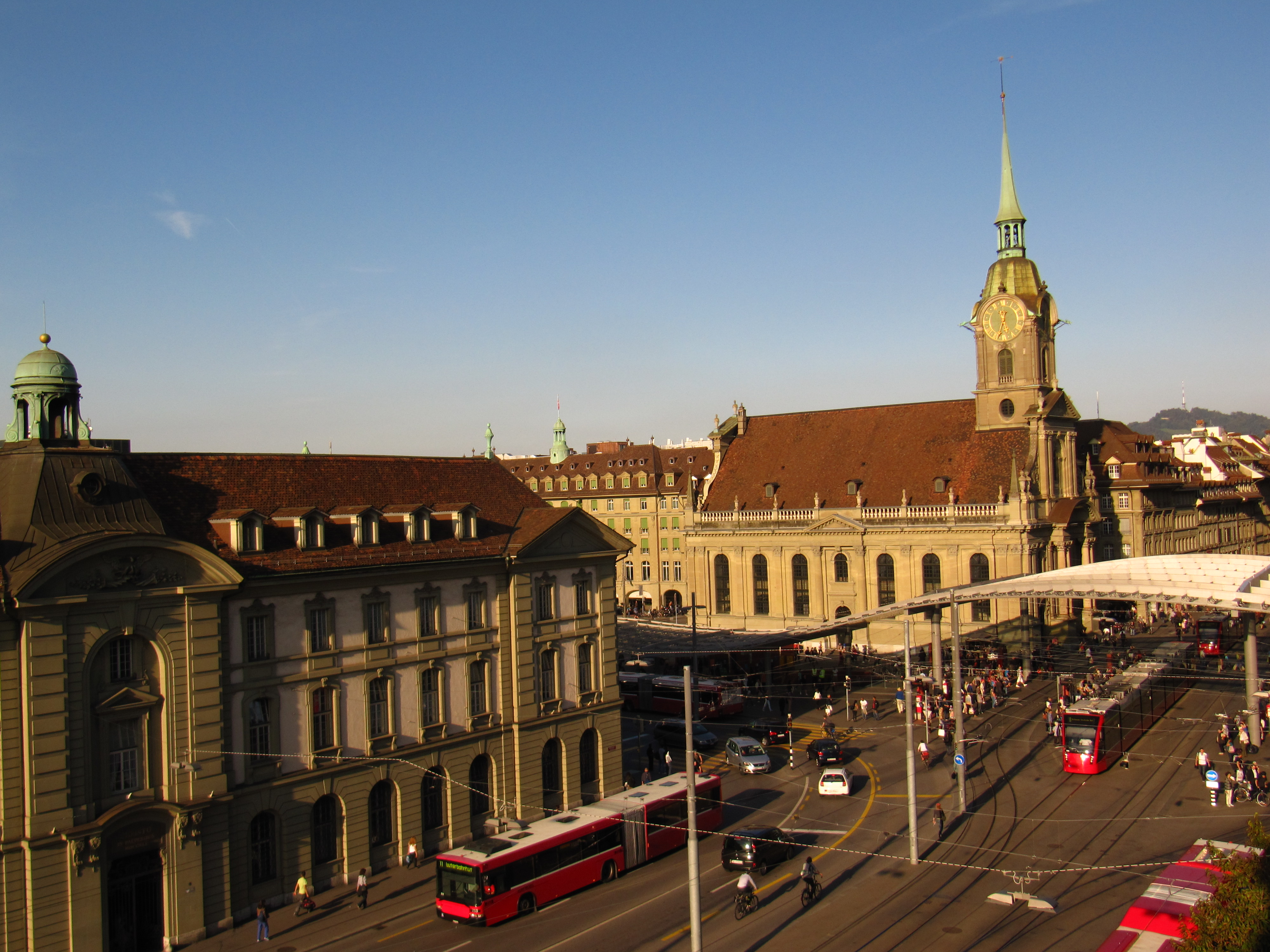 Stadt Bern: Reformierte Heiliggeistkirche in der herbstlichen Abendsonne, photographiert vom Bubenbergplatz 11